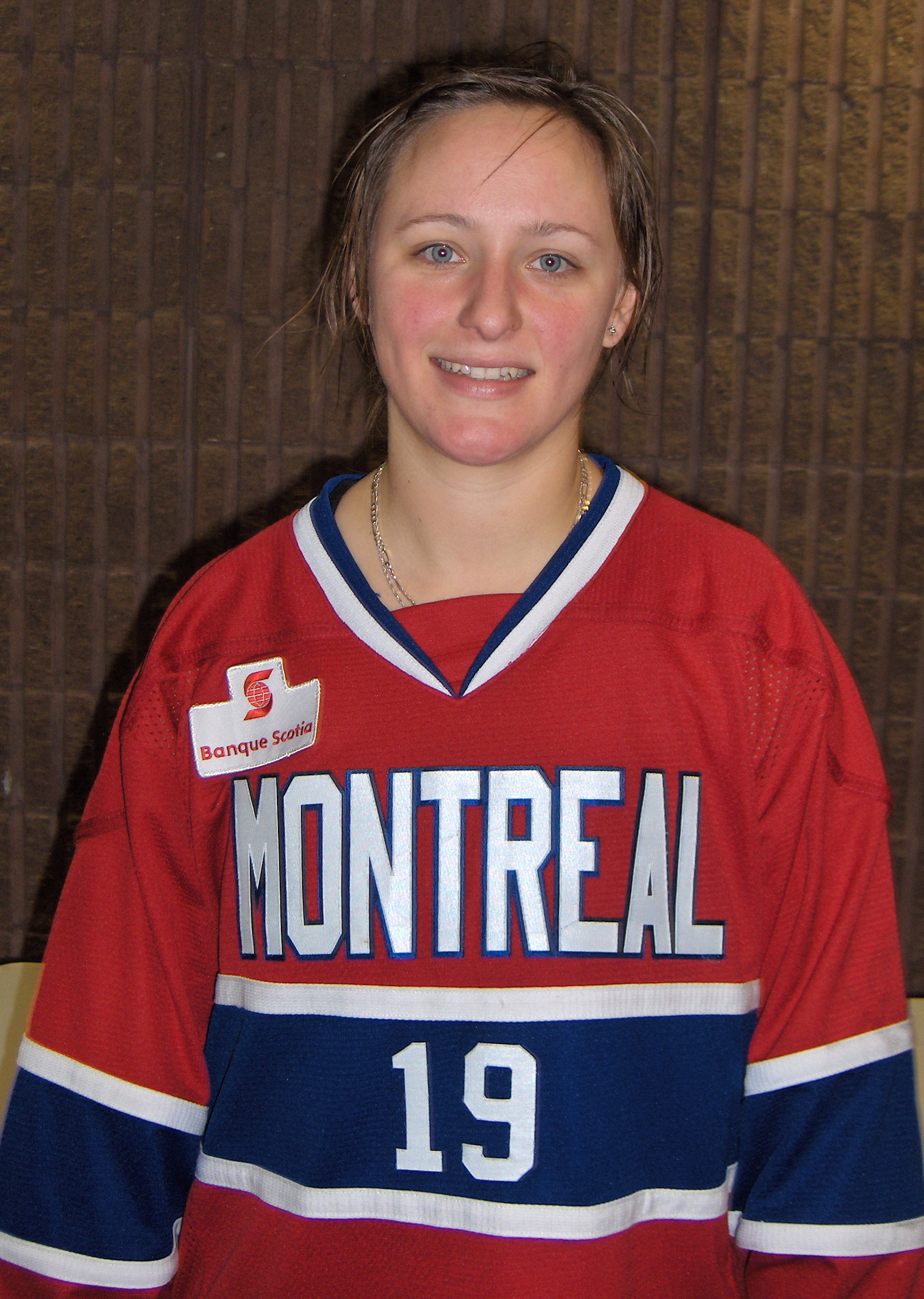 Joueuse des Stars